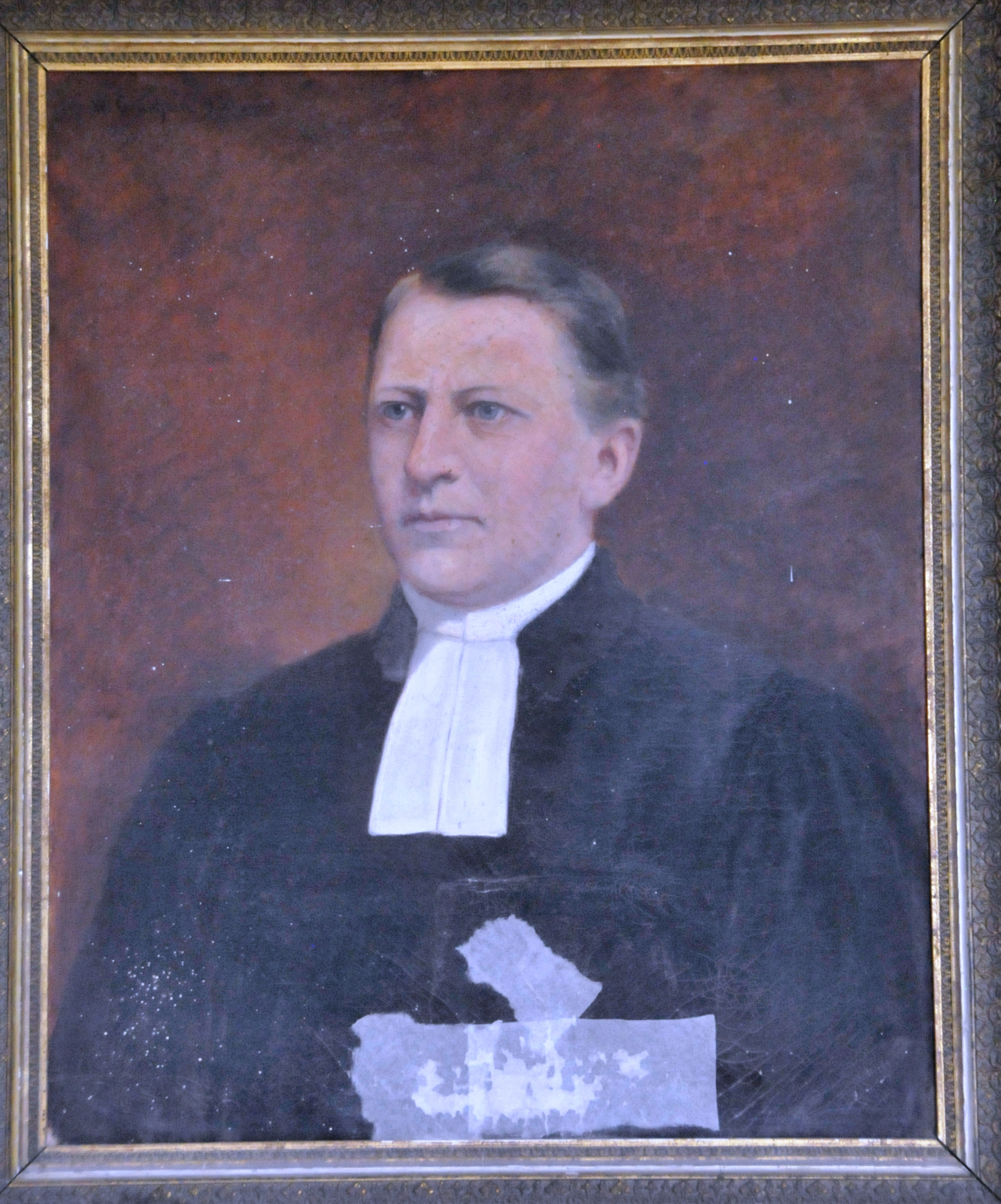 Bienstädt, Porträt von Pfarrer Perthes